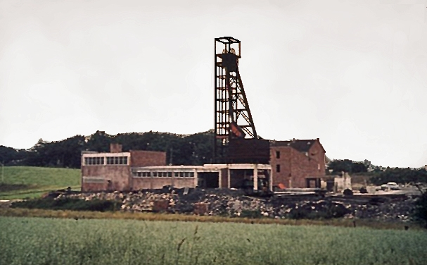 Schacht Niederheide der Zeche Alte Haase in Sprockhövel, Deutschland